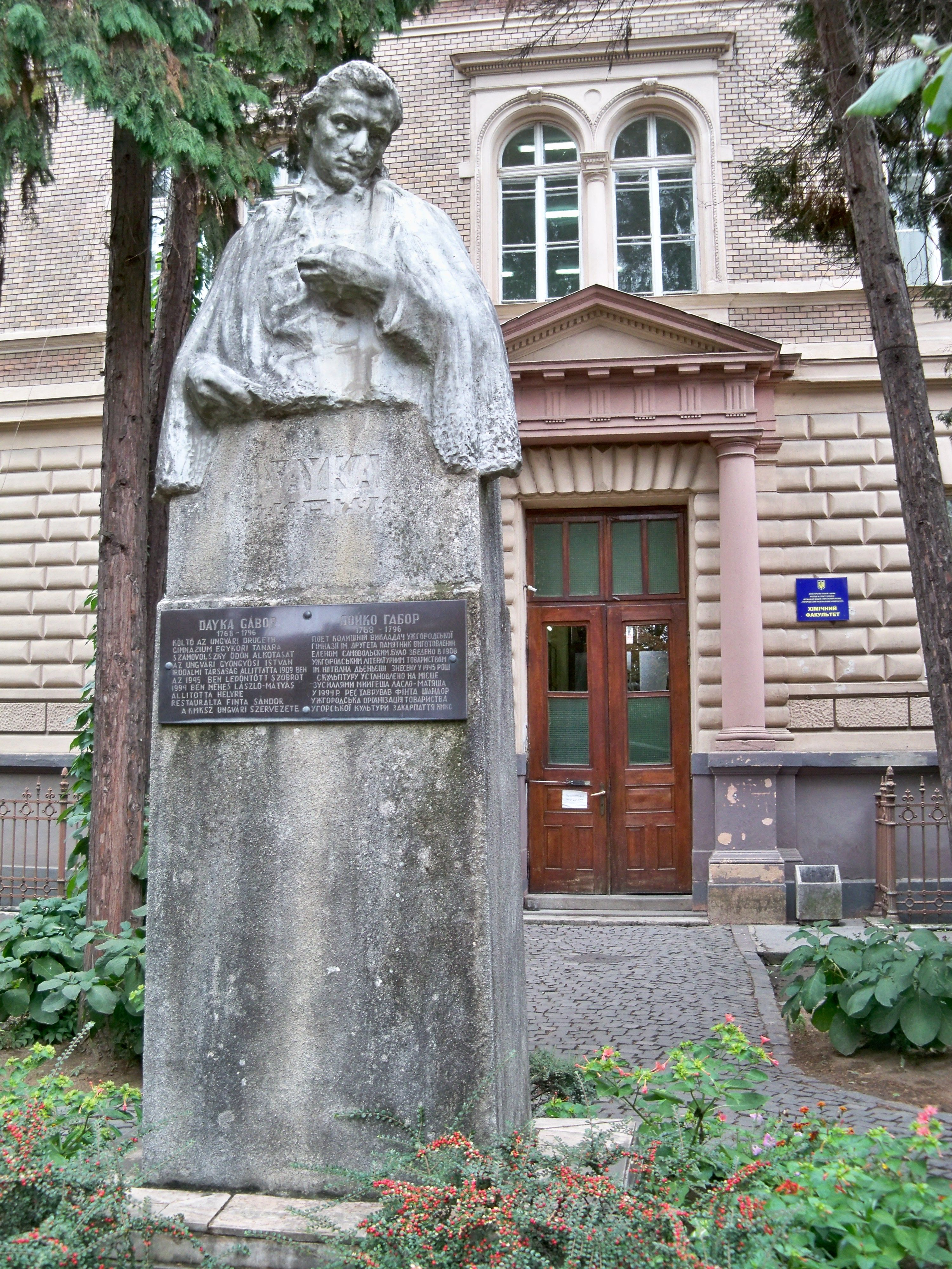 Пам'ятник угорському поету та педагогу Габору Дойко, Ужгород, вул. О. Фединця, 53